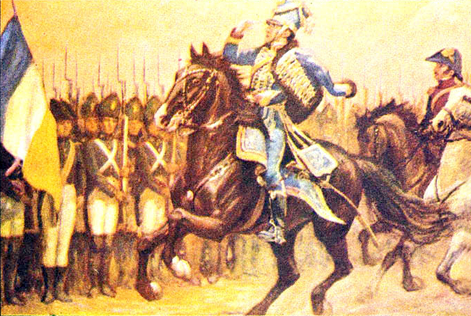 José Miguel Carrera revisando sus tropas